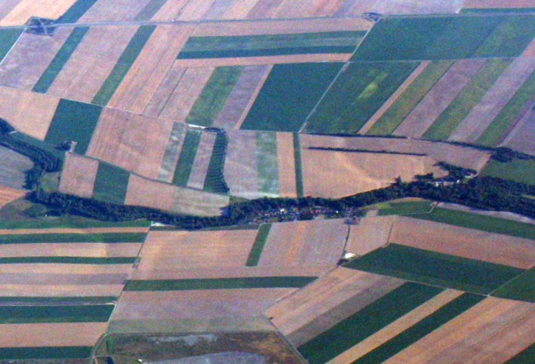 Vue aérienne du village de Vassimont-et-Chapelaine. (Marne, région Alsace-Champagne-Ardenne-Lorraine).